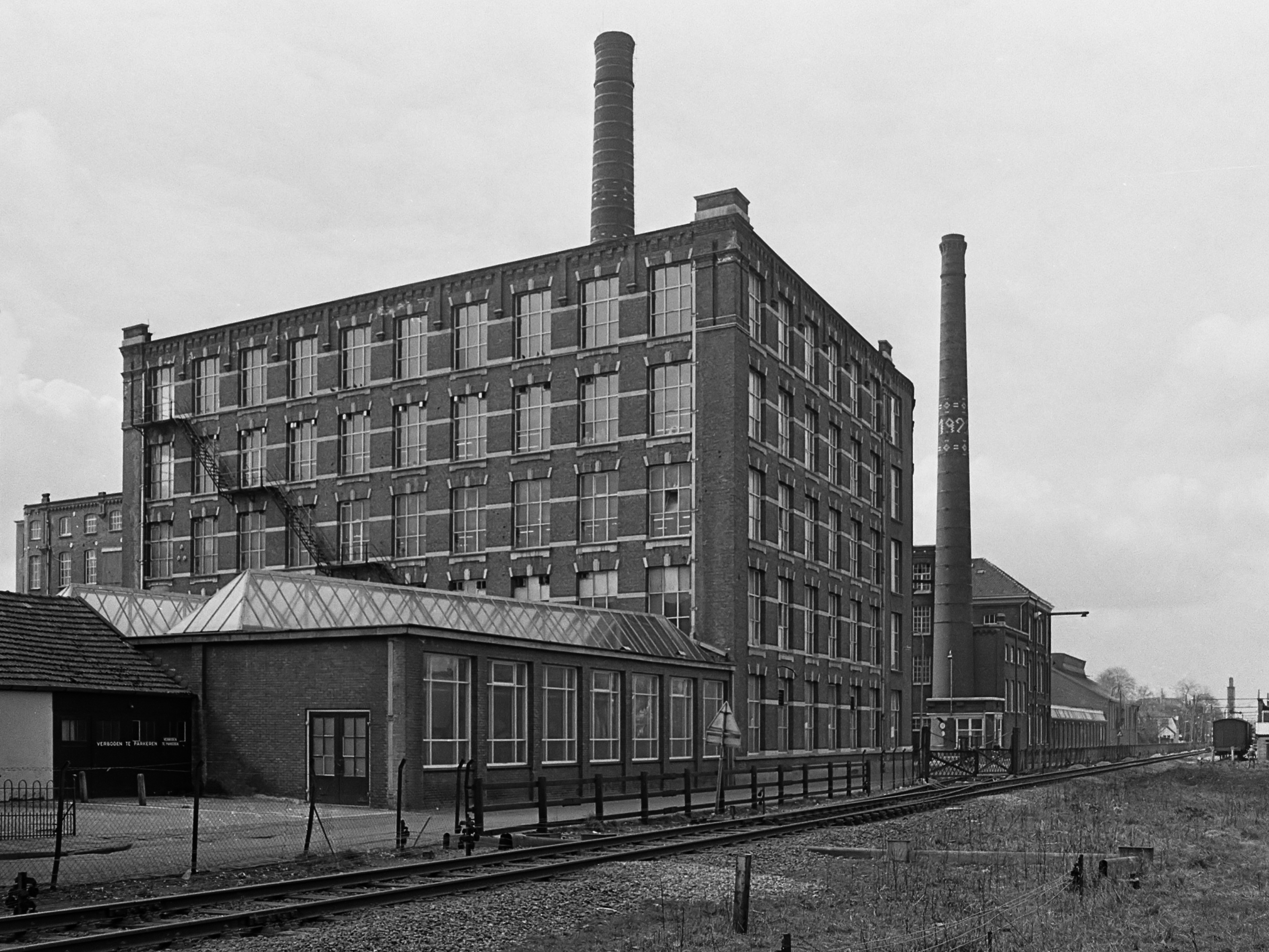 Ontslagen bij Van Heek in Enschede, de spinnerij waar 3000 man ontslagen werden 3 april 1967